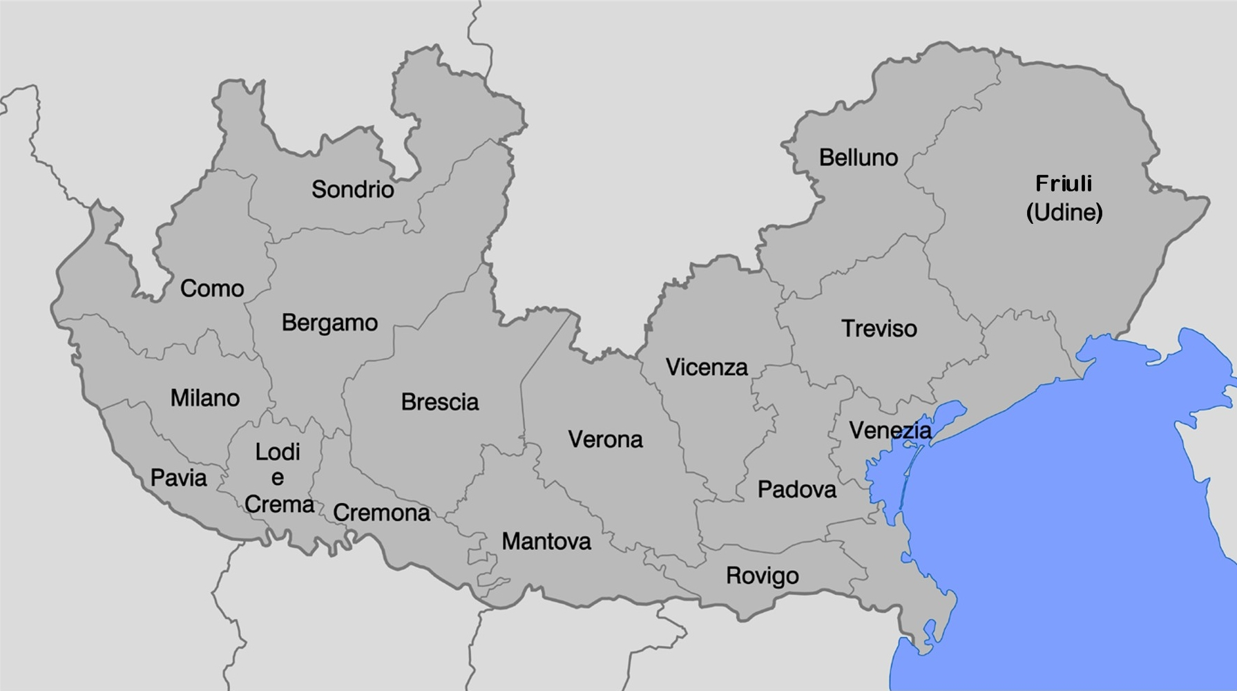 Le province del Regno Lombardo-Veneto (1816-1859)